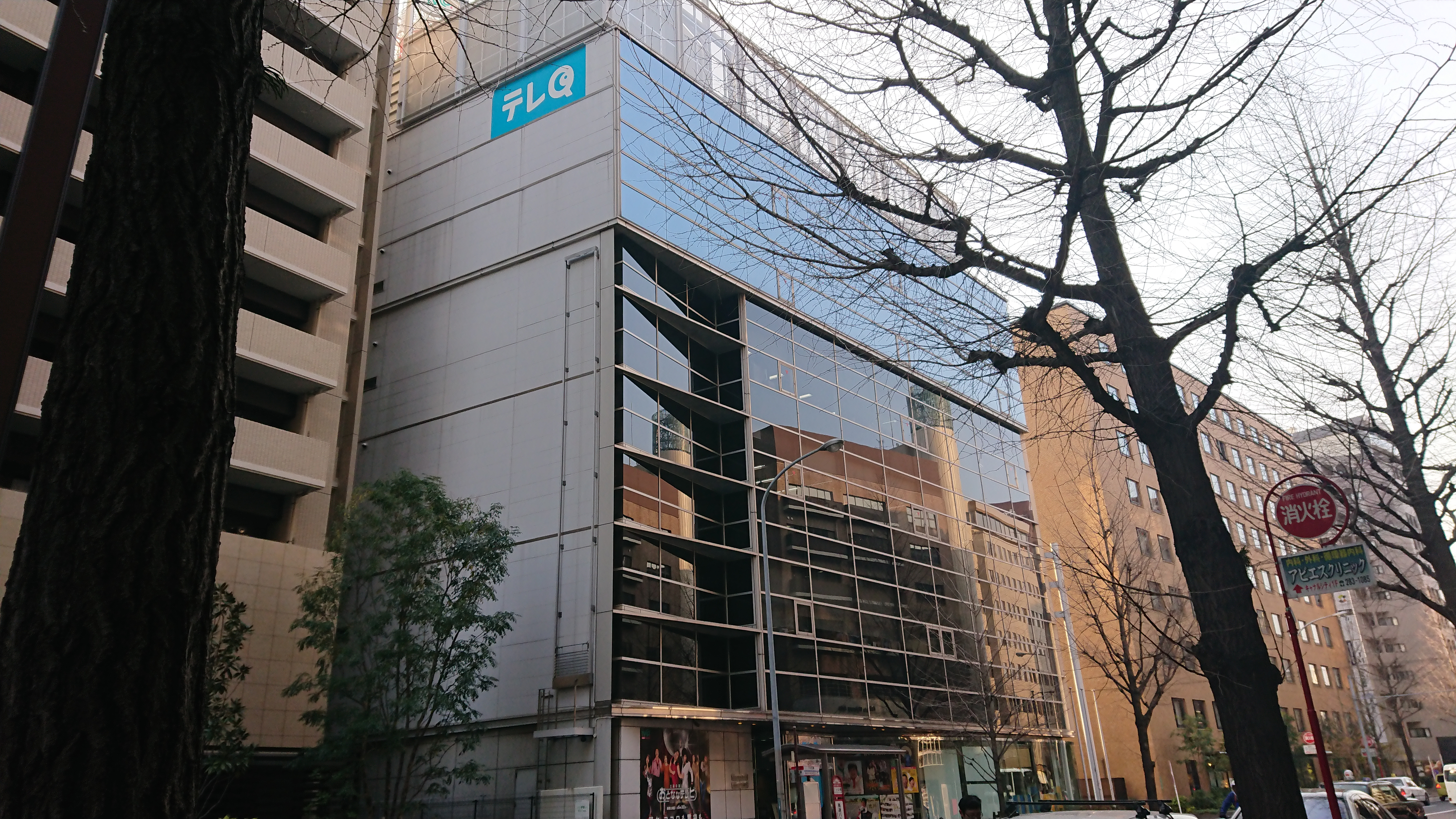 TVQ福岡本社。2019年3月26日撮影。